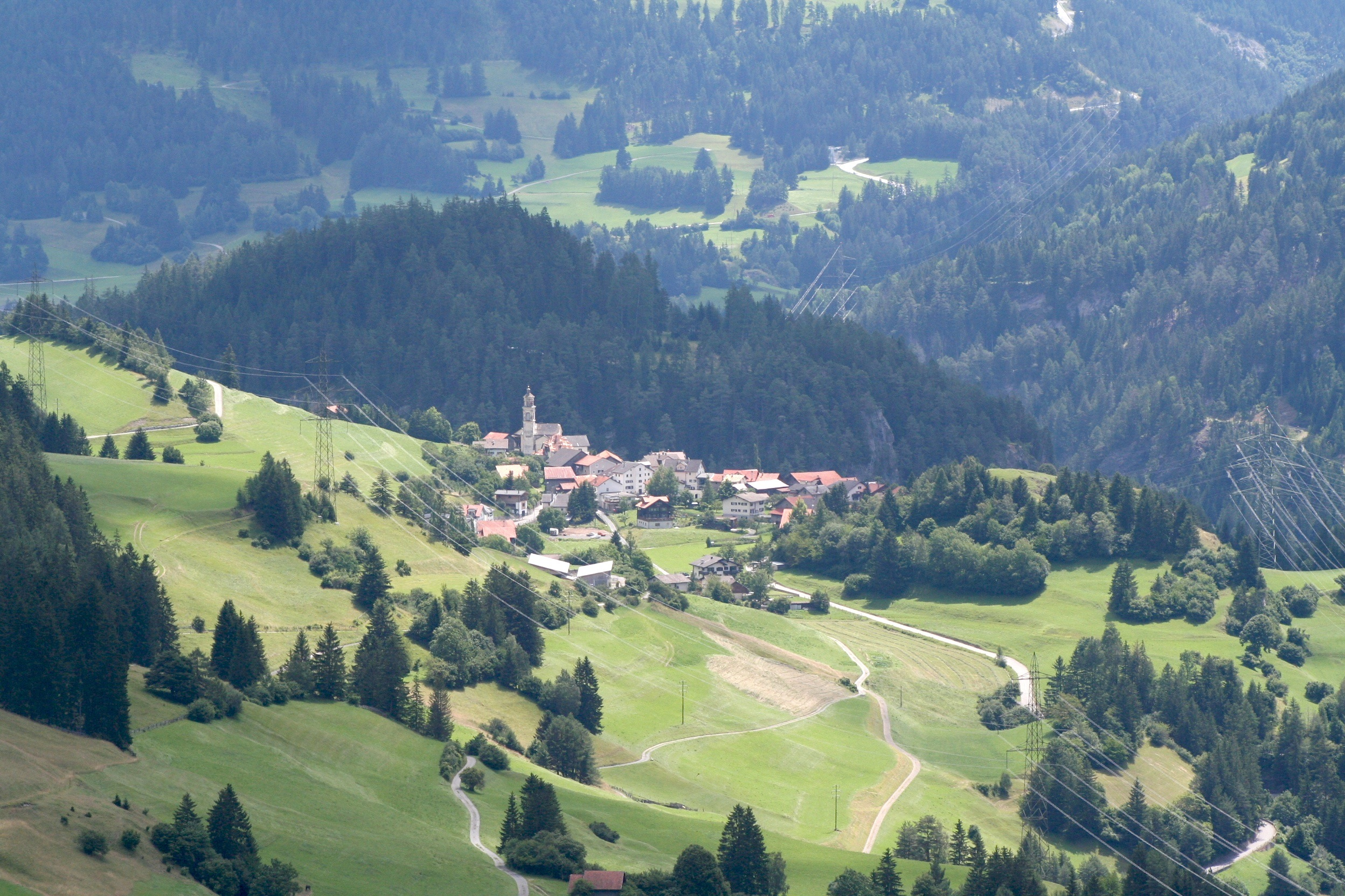 Alvaschein